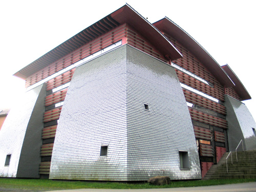 selbst fotografiert